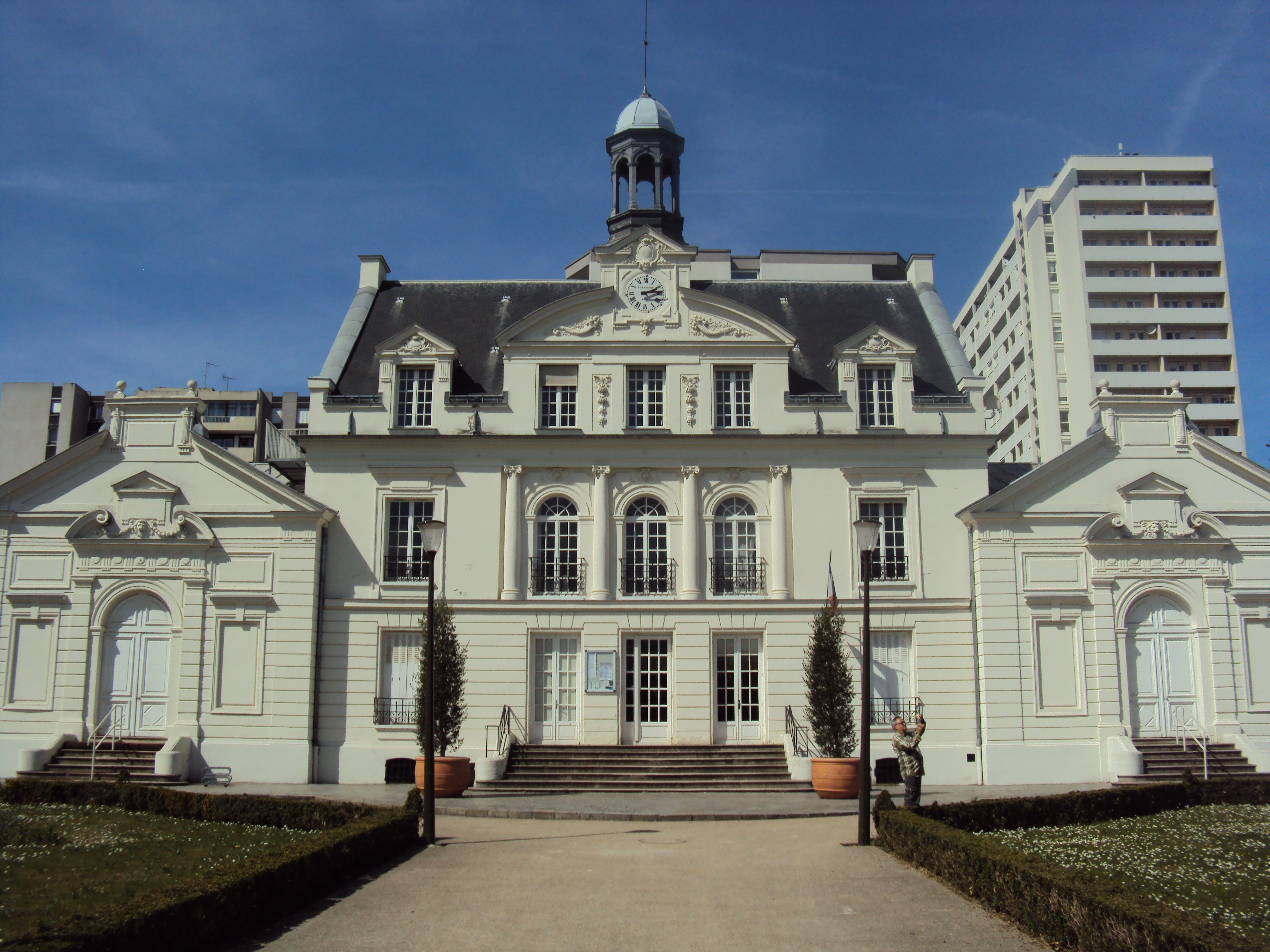 Conservatoire d'Argenteuil